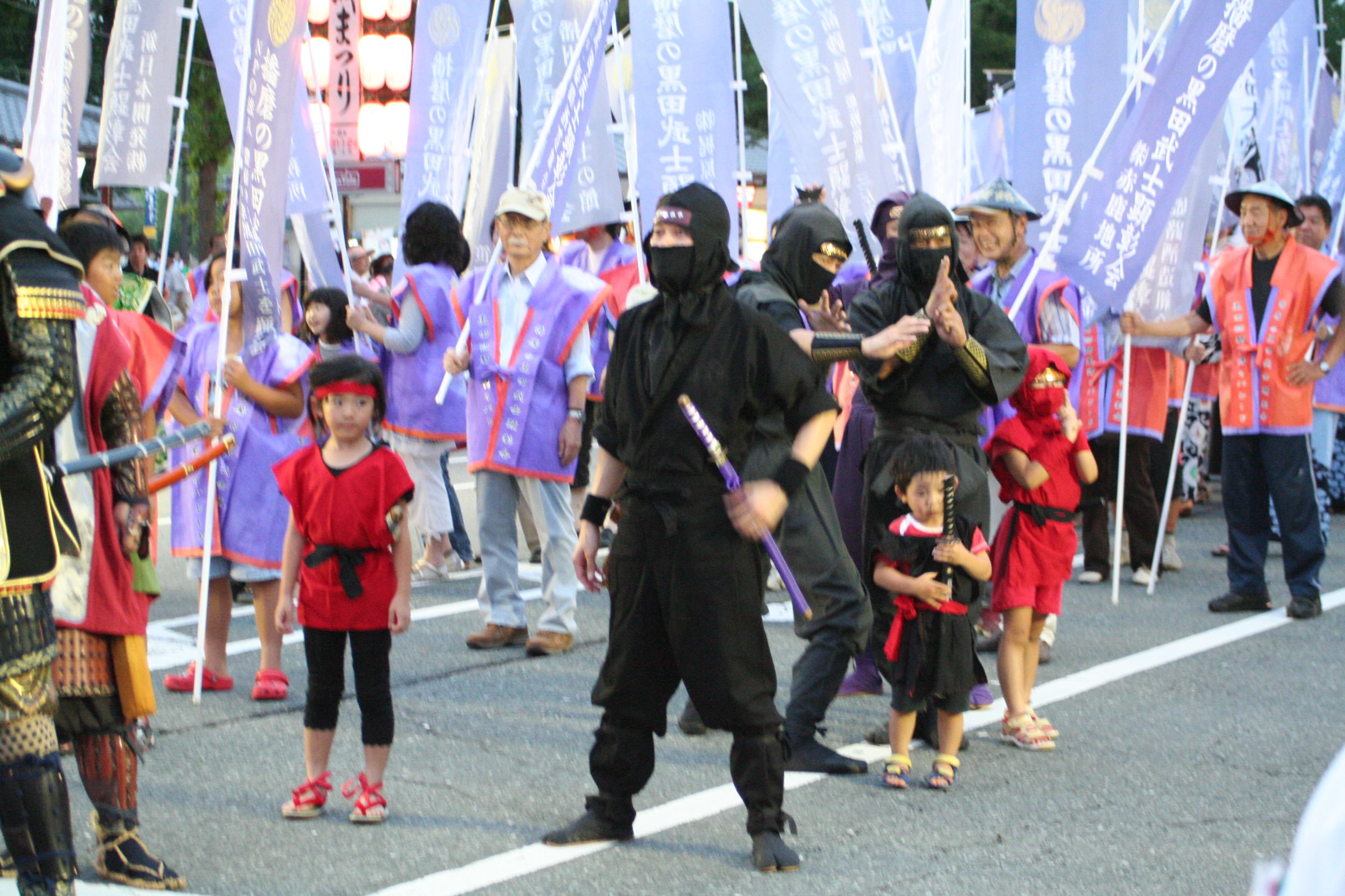 姫路お城祭。兵庫県姫路市にて毎年7月末から8月2日の3日間に渡り姫路城の南部大手前通りにて開催される祭である。第60回開催の2日目の祭の様子。 忍者の衣装を纏った男性。